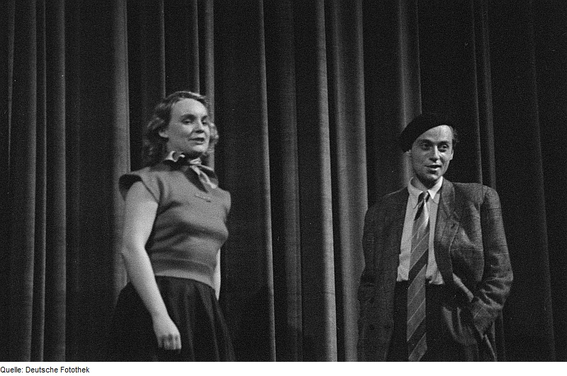 Original image description from the Deutsche Fotothek Ingeborg Krabbe und Gerhard Linke von der Leipziger Pfeffermühle bei ihrem Ersten Programm im Weißen Saal